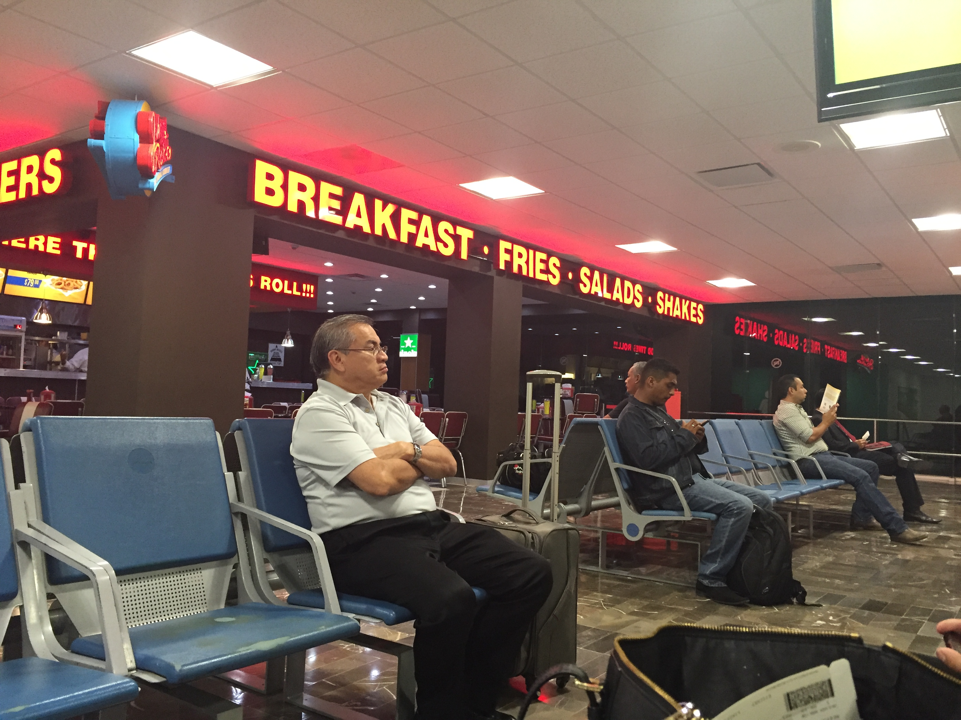 Área de comida del Aeropuerto Internacional de Tampico.